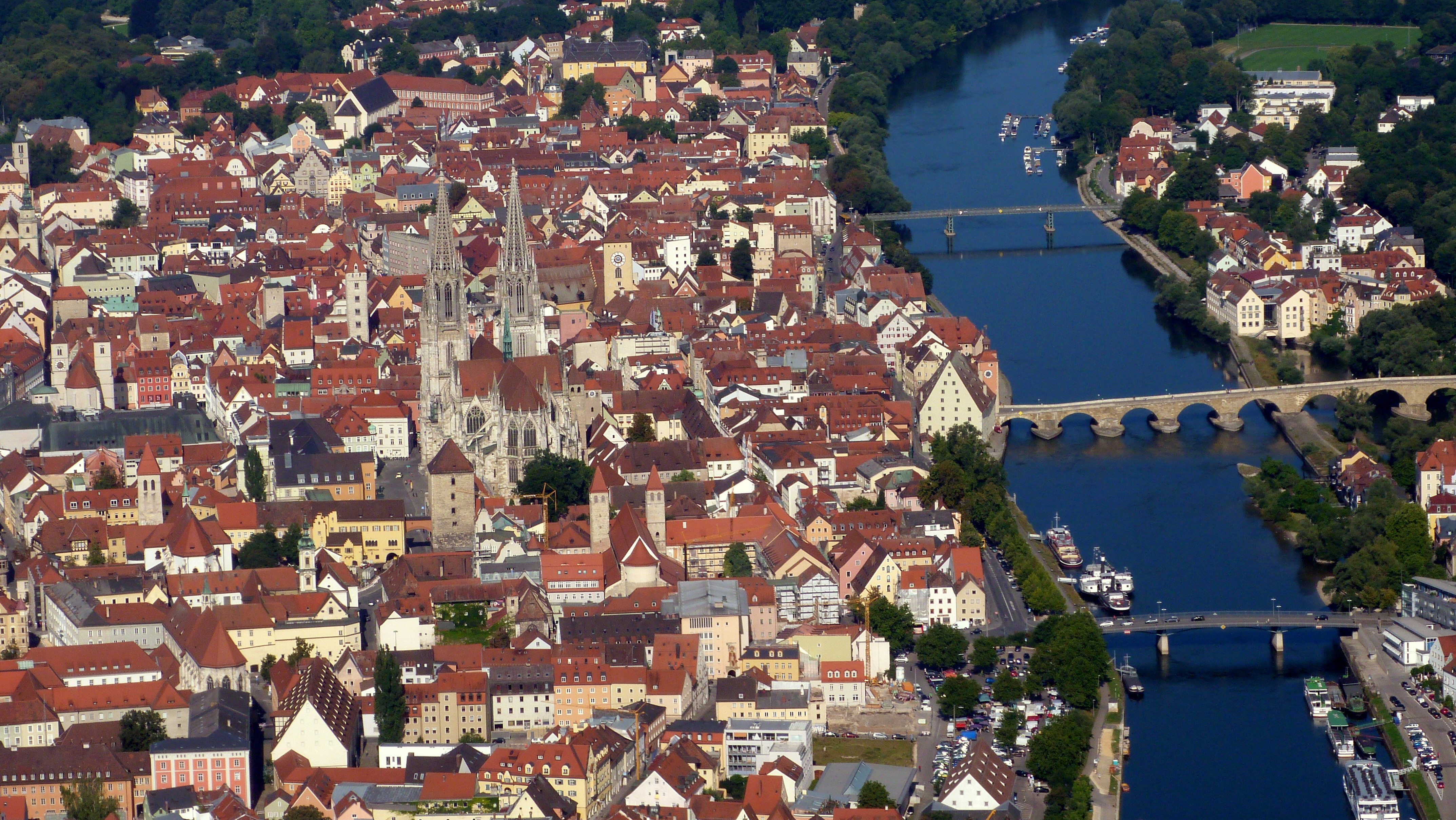 Regensburg aus der Flugzeugperspektive